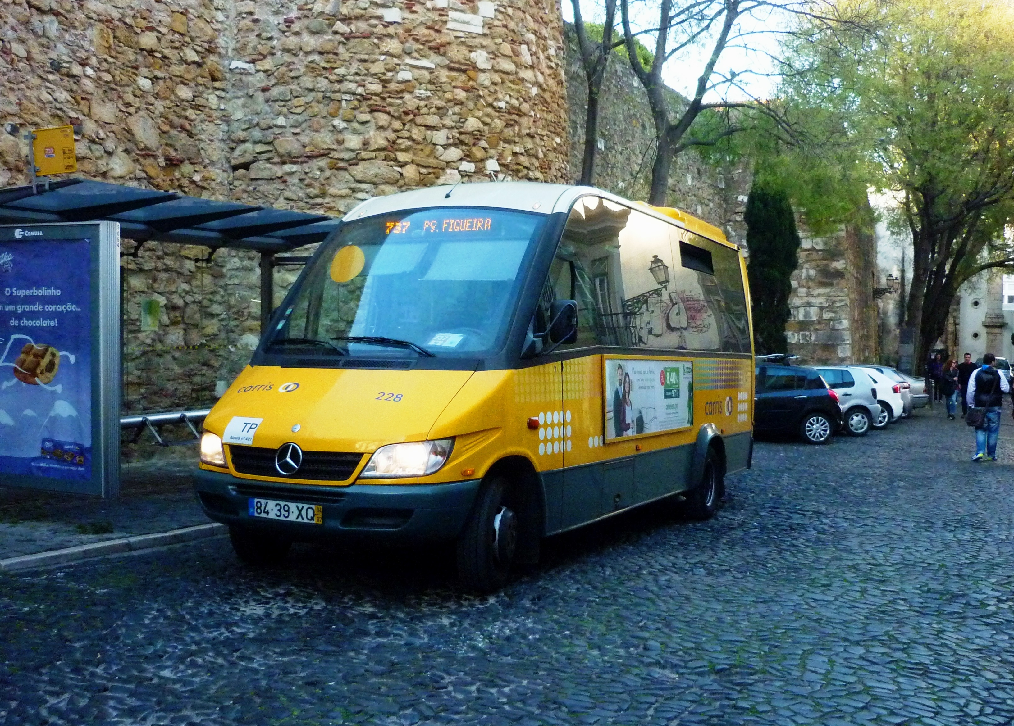 228_Carris